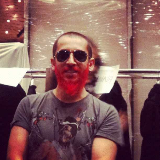 Tanju Babacan